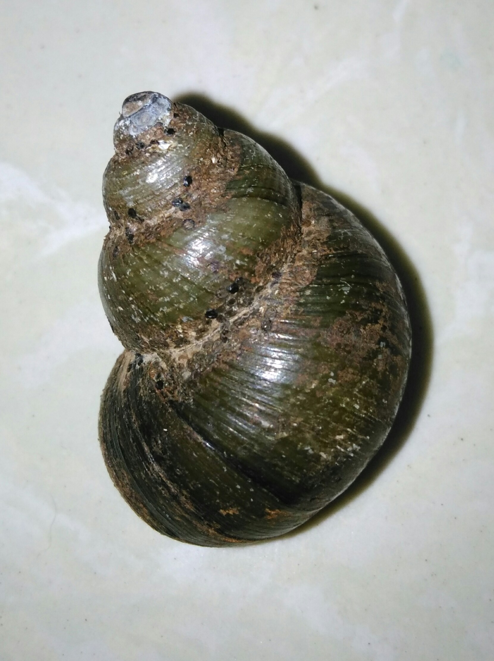 Hình tự chụp bằng điện thoại cá nhân về một con ốc đắng